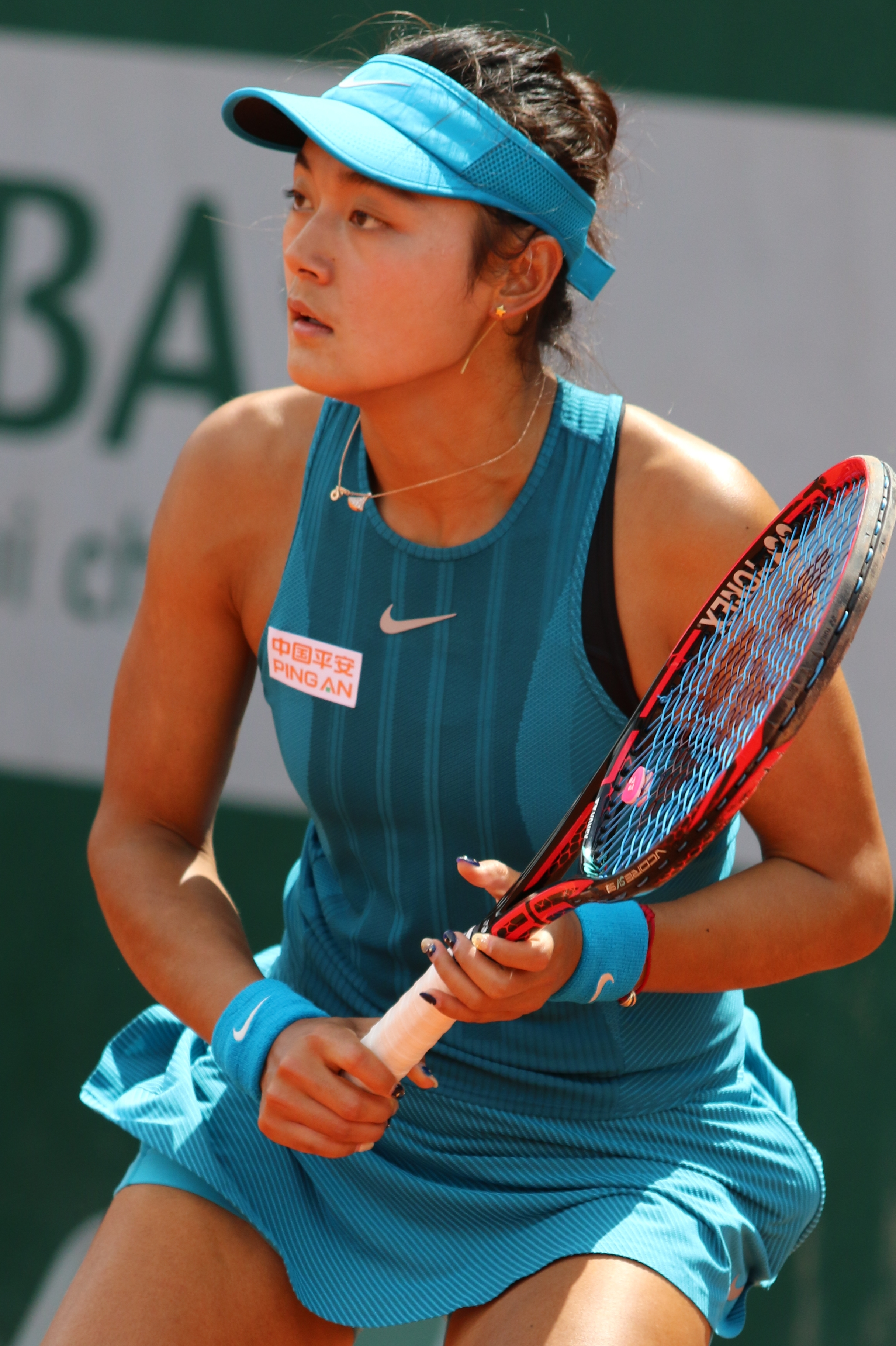 Wang Y. RG18 (14)